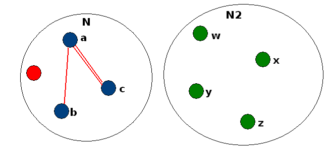 OLSR_Algo_de_selection_MPR Contents 1 Licensing 2 Source 3 Licensing 4 Original upload log Licensing Source création personelle